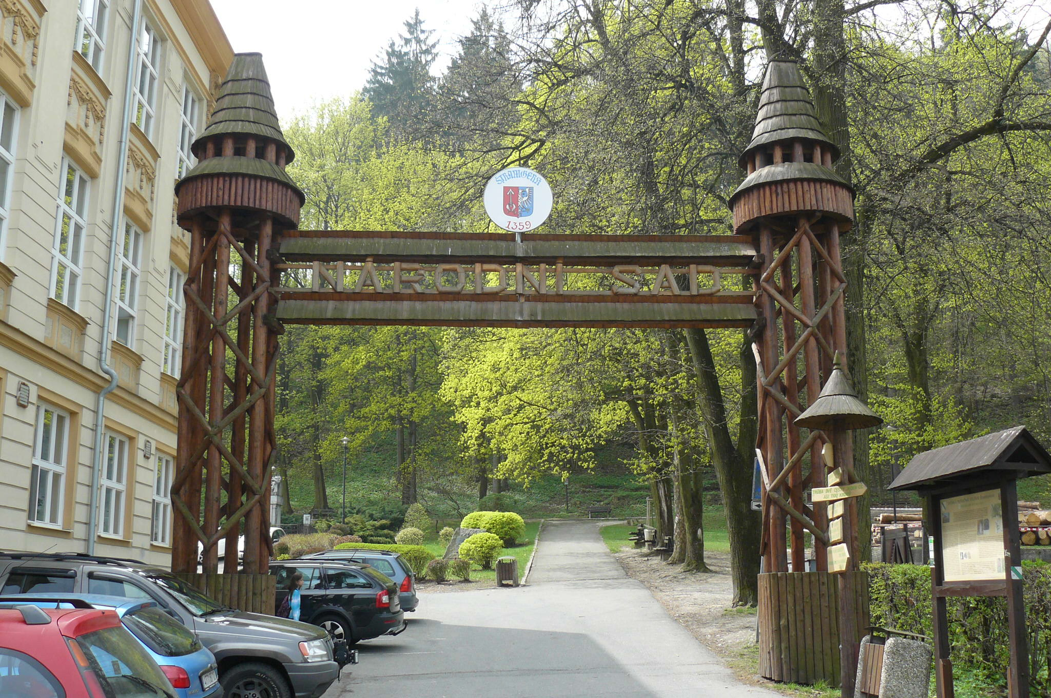 Kotouc, Stramberk, Narodni Sad.